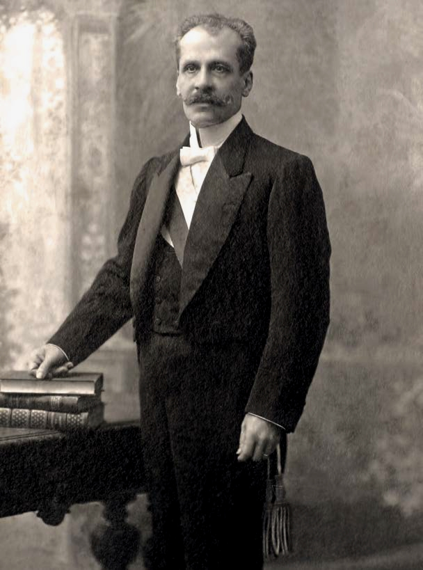 Manuel Candamo, presidente del Perú de 1903 a 1904.